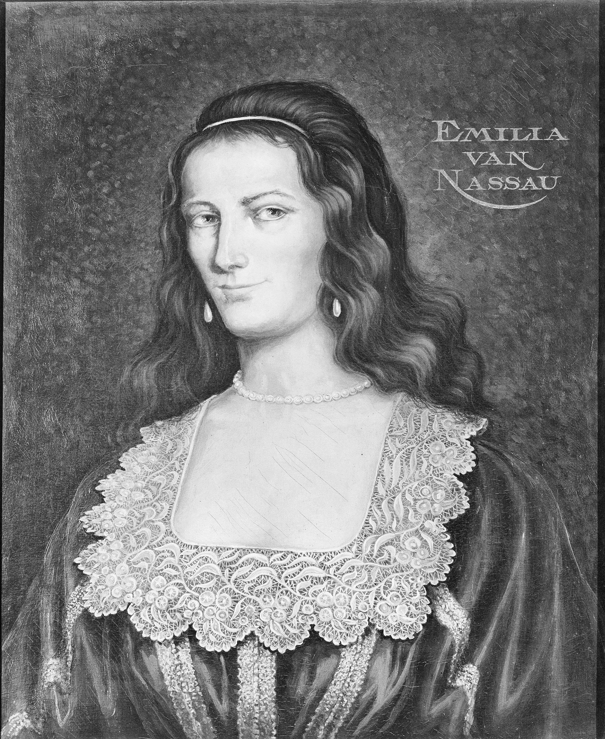 Geportretteerde overleed in 1629.